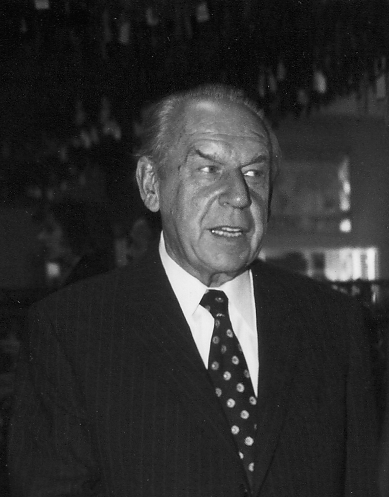 Verleihung der Goldenen Pelzmotte an Gerd Kursawe, Hans Quaet-Faslem, Martin von Schachtmeyer, 1976. Ausschnitt: Paul Kunze (Kürschnermeister, Mannheim)